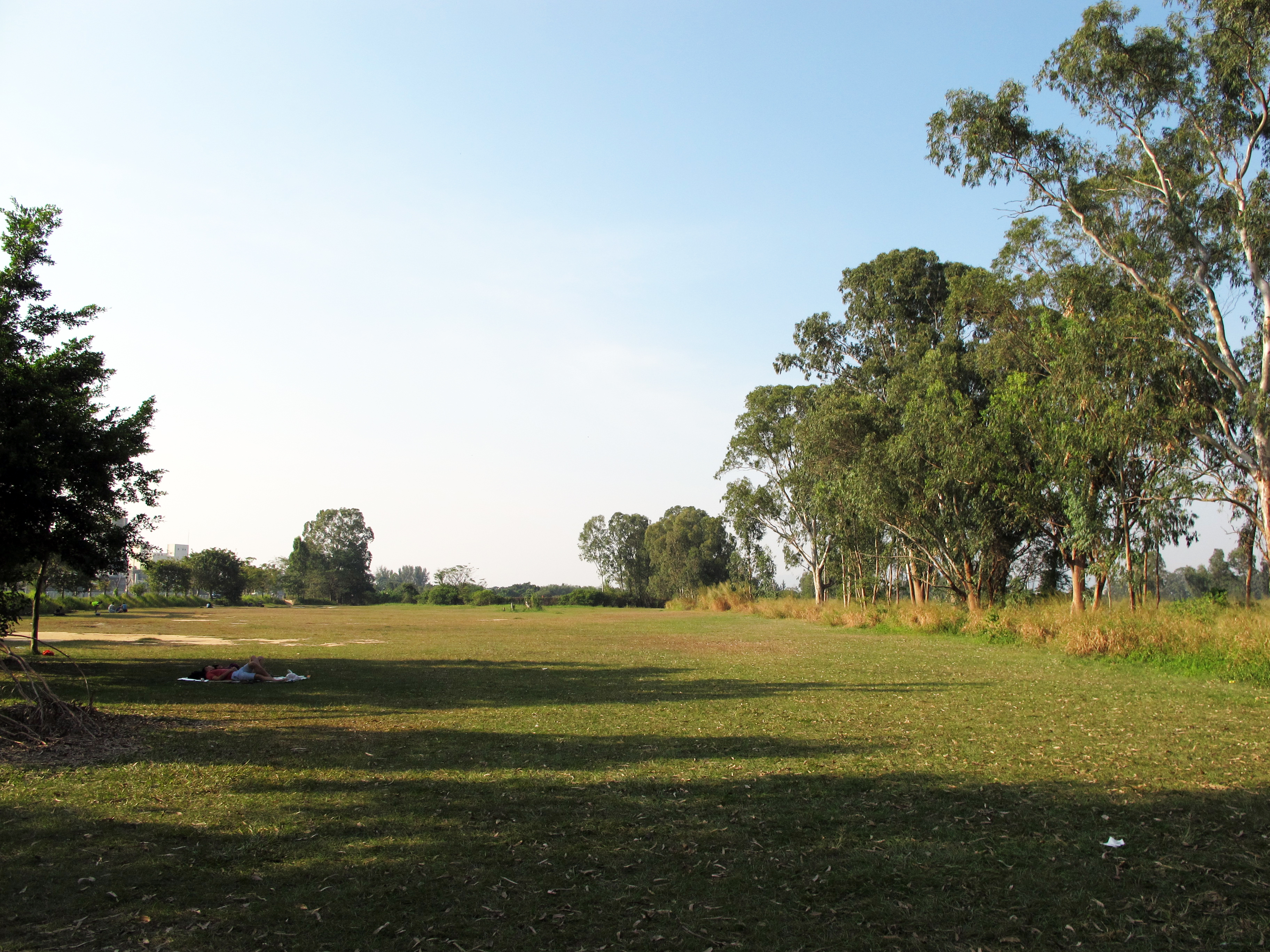 Nam Sang Wai Lawn